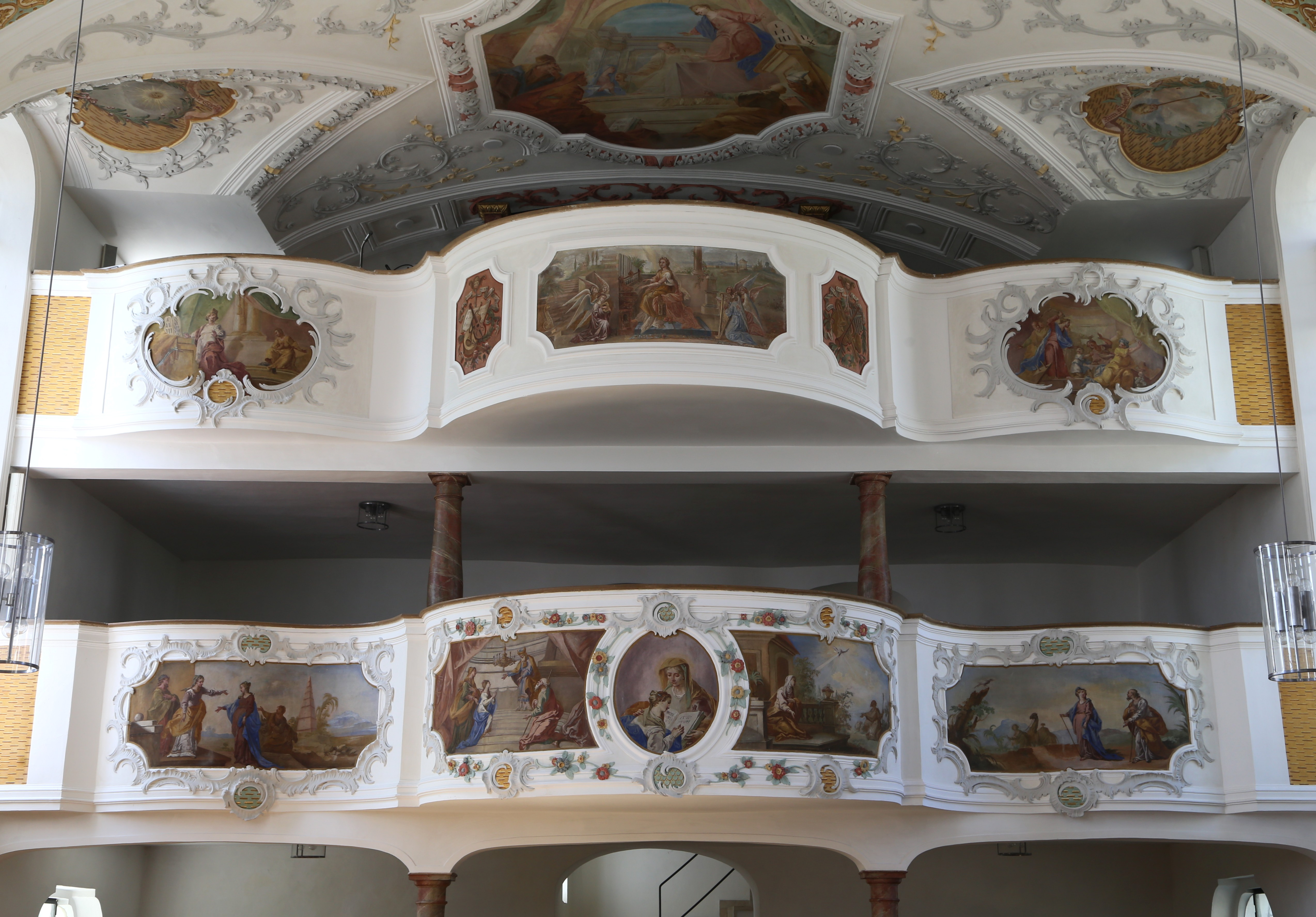 Augsburger Straße 1, Dinkelscherben; Katholische Pfarrkirche St. Anna, 1507 errichtet, Turm um 1580, Barockisierung 1717 und 1770; mit Ausstattung